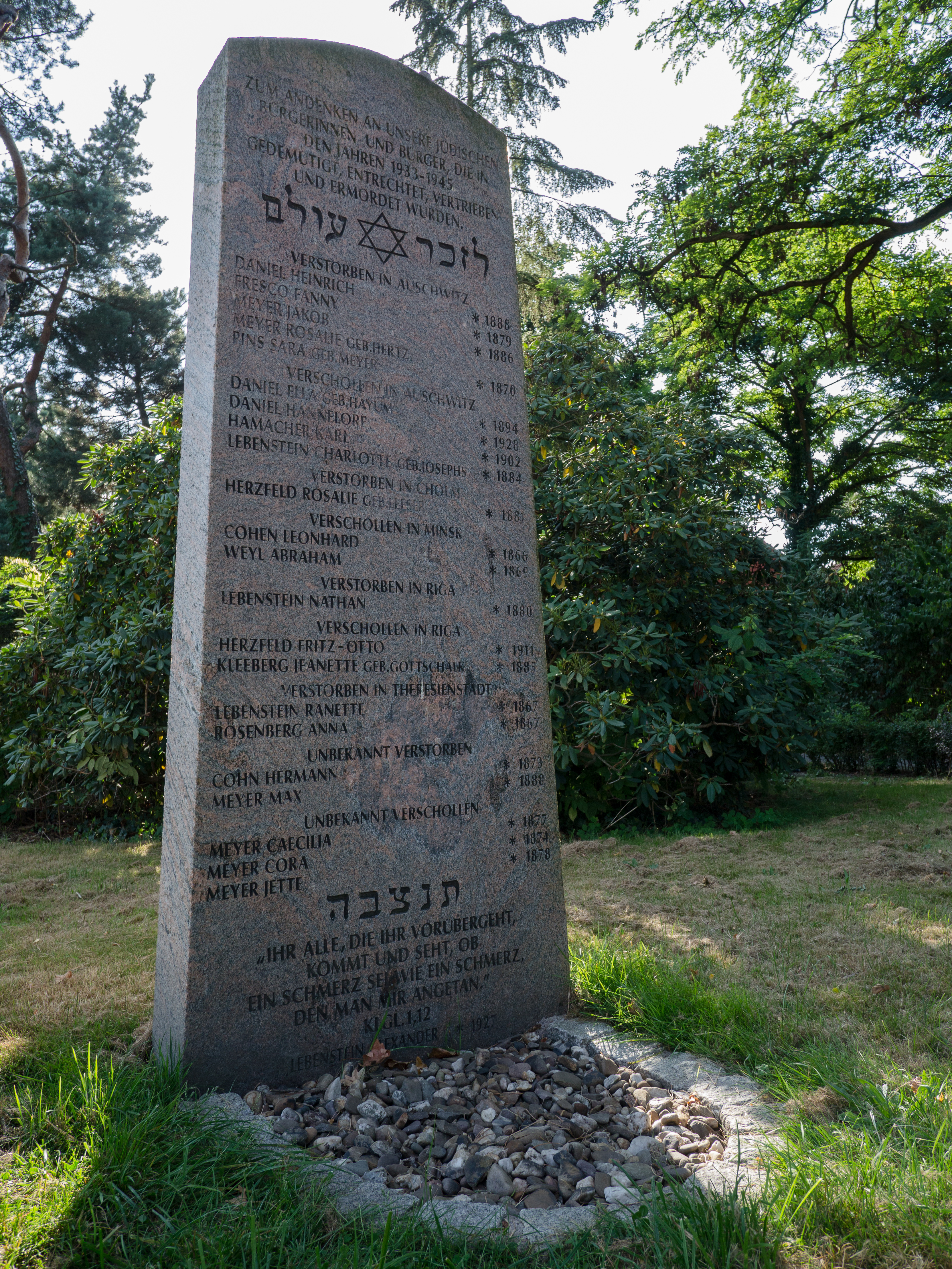 jüdischer FriedhofThis is a photograph of an architectural monument., no. 64